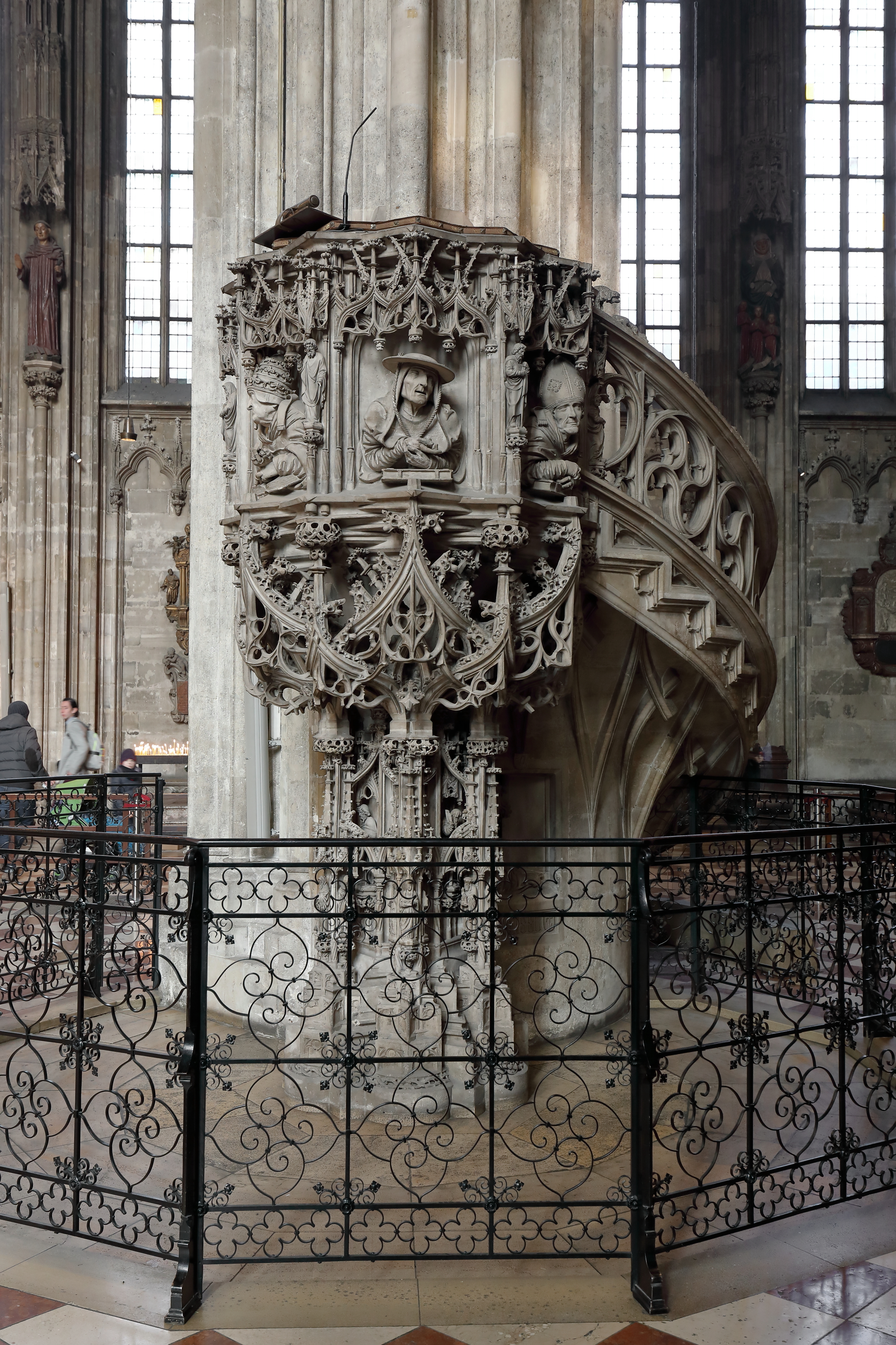 Die Domkanzel des Stephansdoms in der österreichischen Bundeshauptstadt Wien.Die aus 3 Sandsteinblöcken bestehende Domkanzel wird Anton Pilgram zugeschrieben und wurde um 1510 vollendet. Am Kanzelkorb sind die 4 Heiligen und Kirchenväter Augustinus mit Mitra, Gregor der Große mit Papstkrone, Hieronymus mit Kardinalshut und Ambrosius mit Mitra dargestellt (v.l.n.r.).